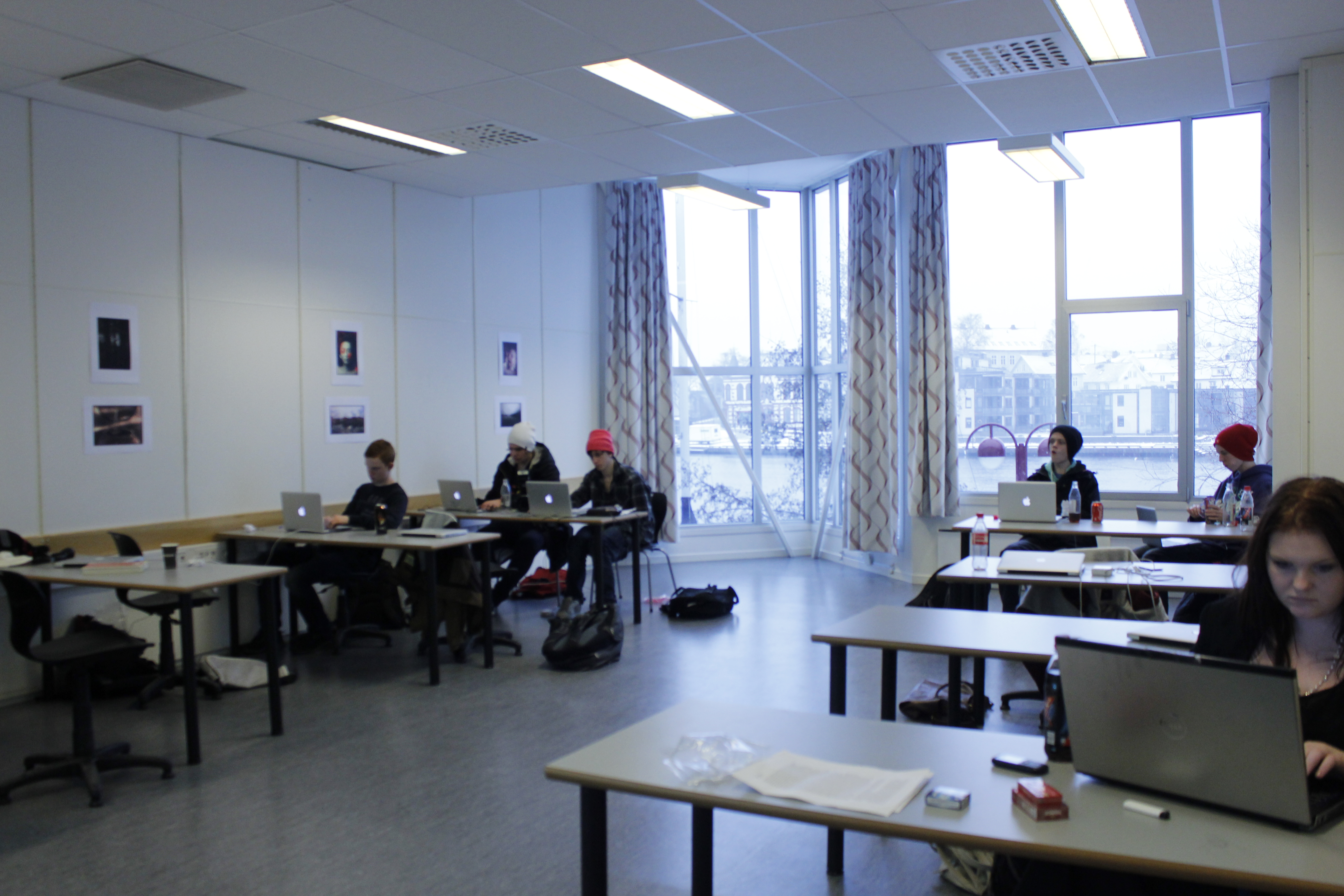 klasserom med utsikt